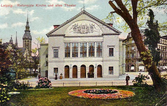 Das Alte Theater in Leipzig, kolorierte Photographie von 1906 Sonstiges: Schutzfrist abgelaufen